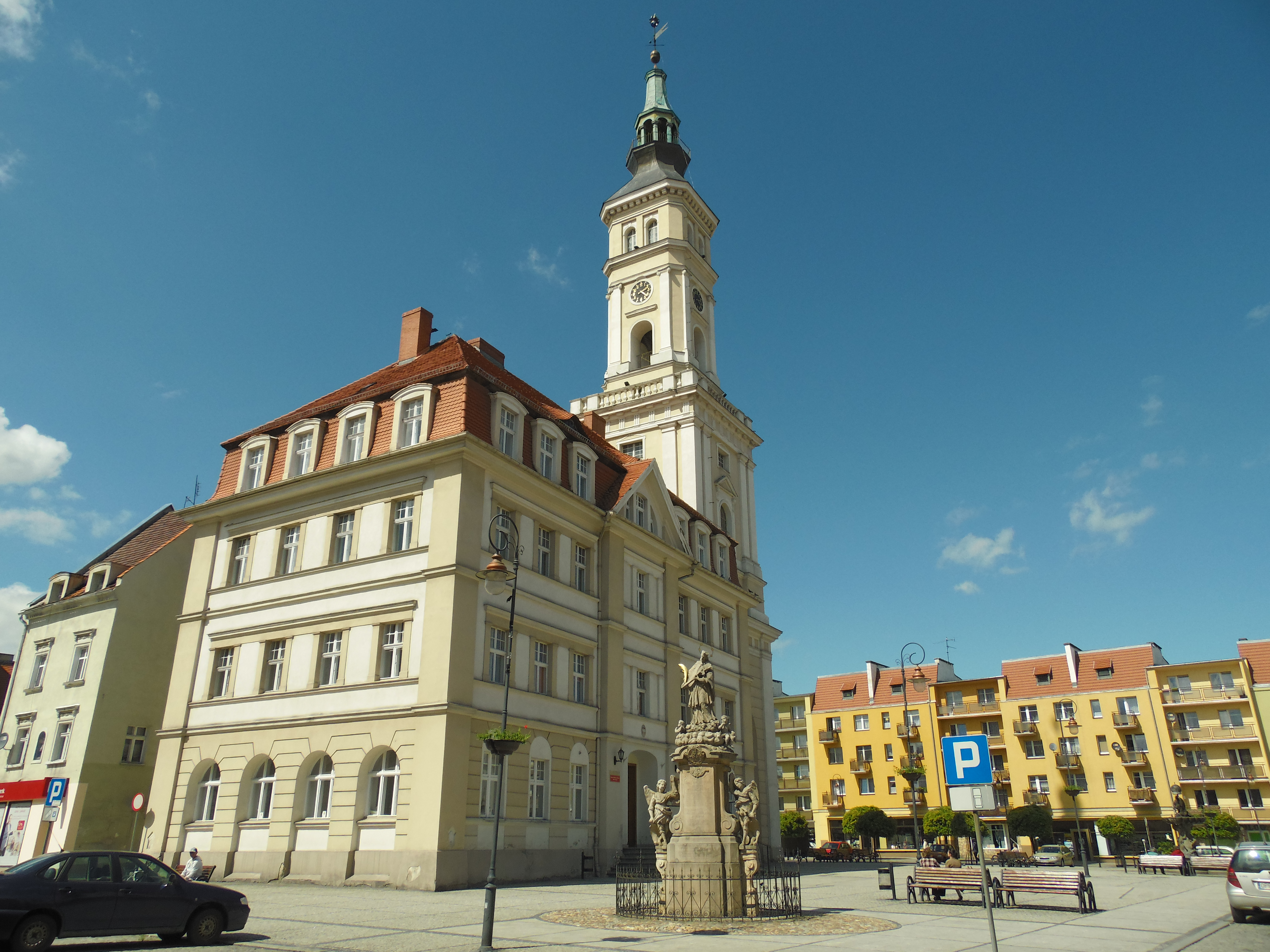 Prudnik, ratusz (XVIII w., 1840) 10.1958. Pierwotnie miała polski napis, został zlikwidowany za Fryderyka II na jego koszt